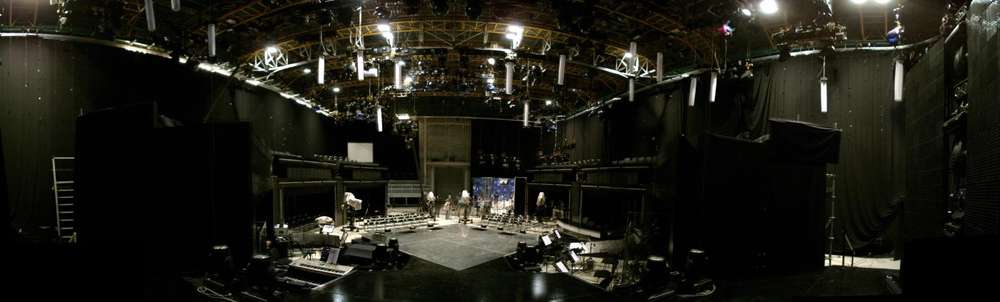 Hrvatska radiotelevizija, Zagreb